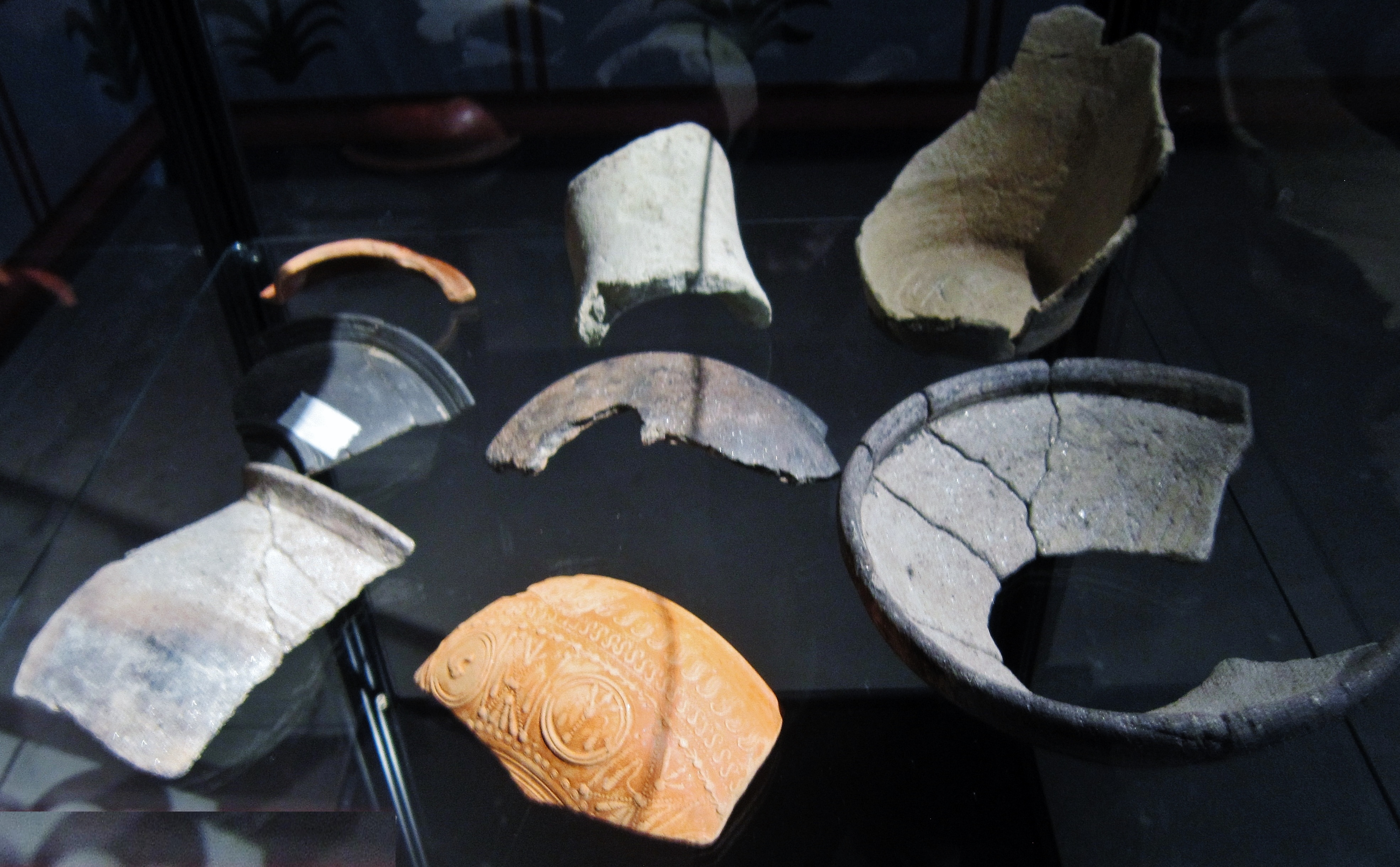 Débris de céramiques trouvés au temple romain de Trégouzel en Douarnenez (1er ou 2e siècle après J.-C., Collection du Service Archéologique Bretagne, exposition L'empreinte de Rome, musée de Douarnenez).